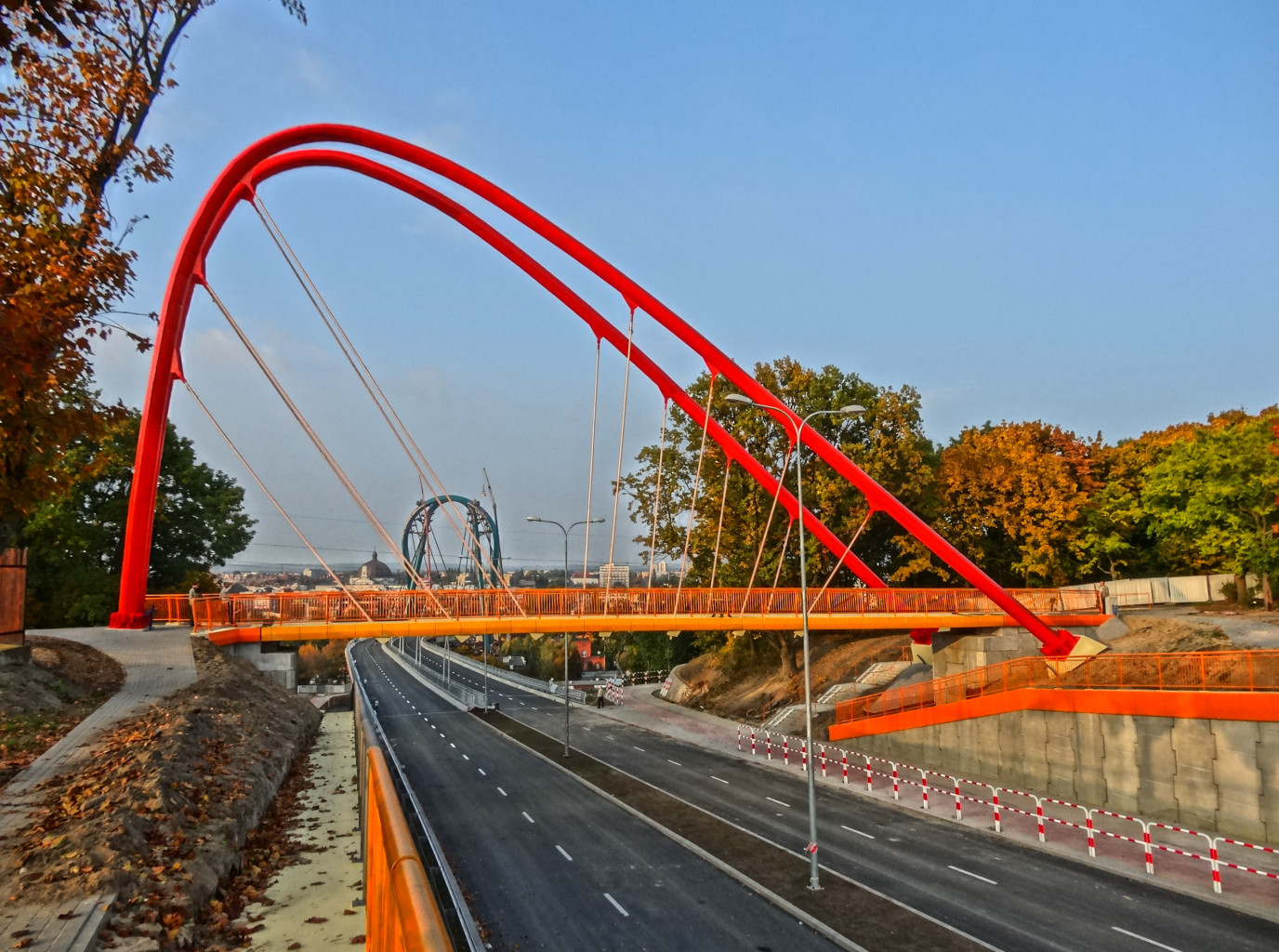 Kładka dla pieszych nad Trasą Uniwersytecką w ciągu ścieżki spacerowej górnego tarasu Bydgoszczy